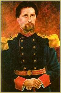 Oleo del teniente coronel Pedro Ruiz Gallo, Museo Aeronautico del Perú, Lima